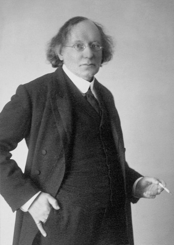 Портрет Вячеслава Иванова